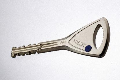 Klucz Abloy Protec